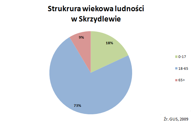 Struktura wiekowa w Skrzydlewie